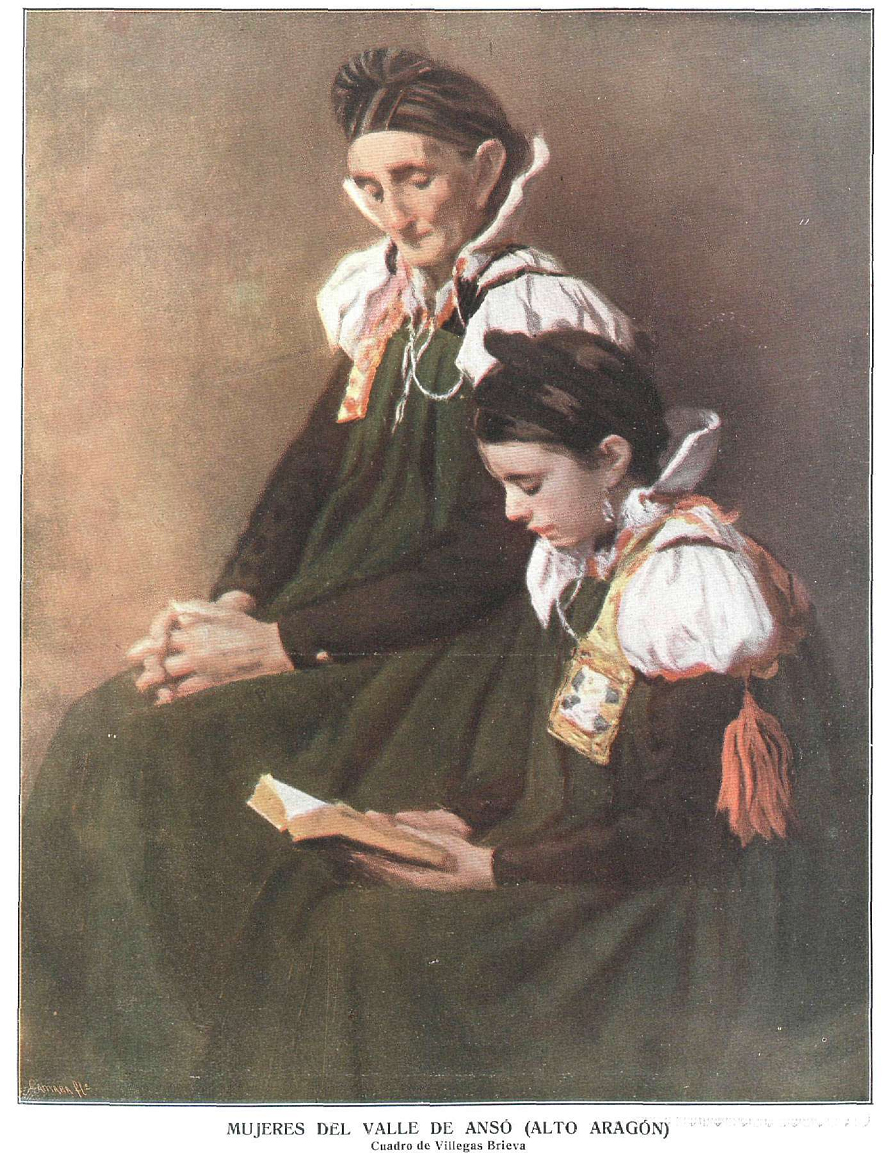 Mujeres del valle de Ansó (Alto Aragón), en la revista española La Esfera.